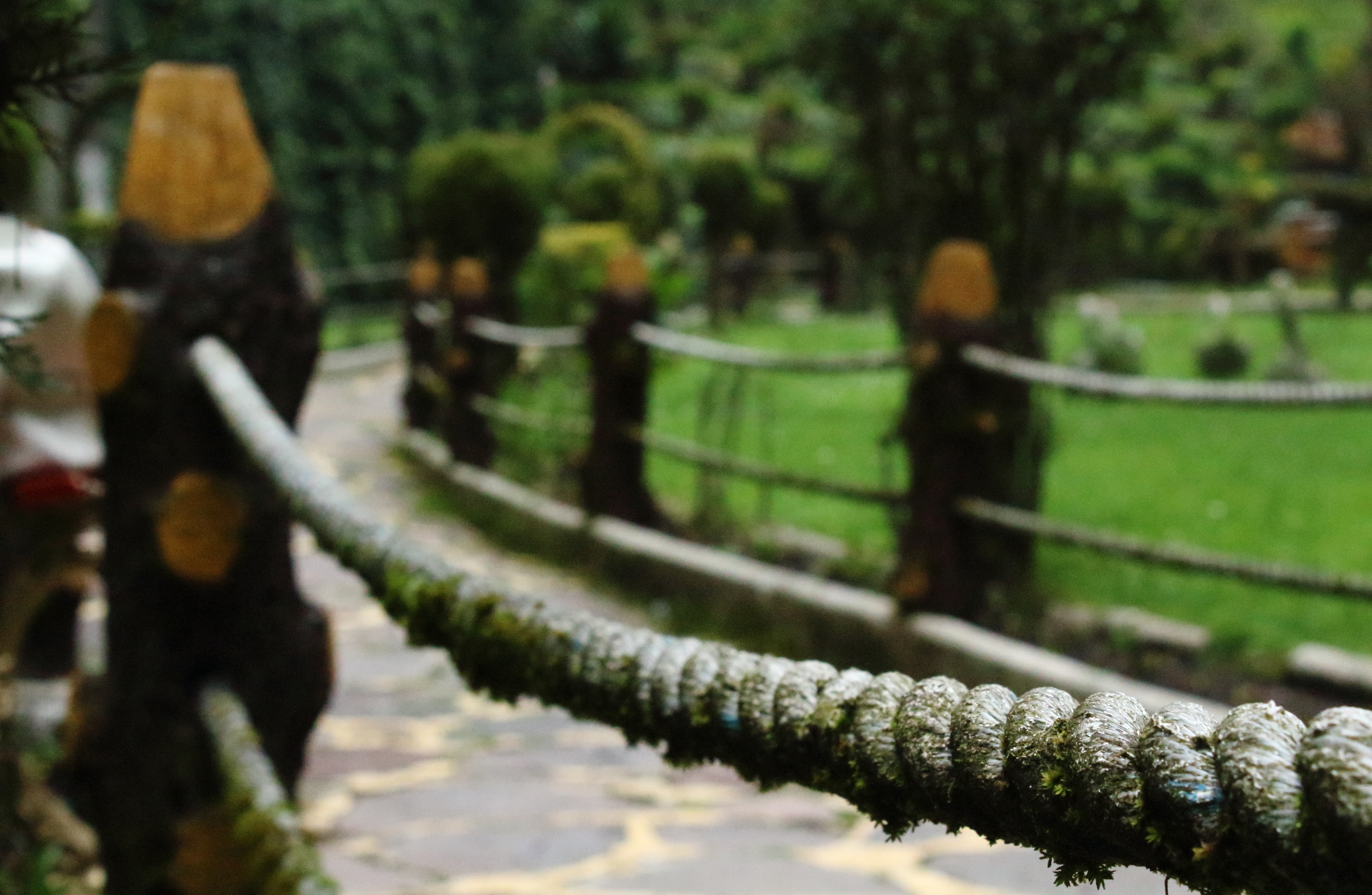 Camino hecho de cuerdas y troncos.